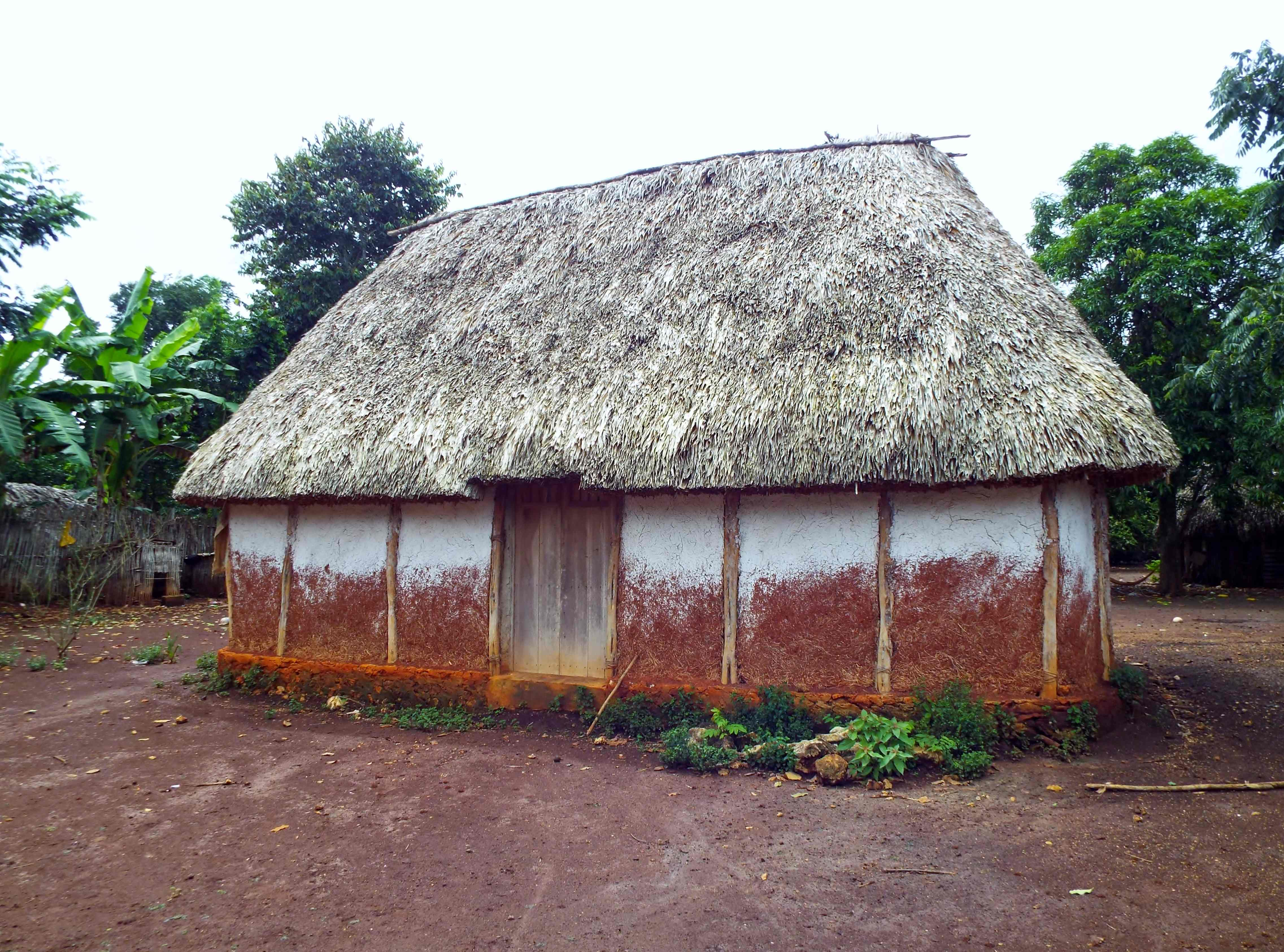 Casa maya construida de manera tradicional. Conocida en maya como xa'anil naj